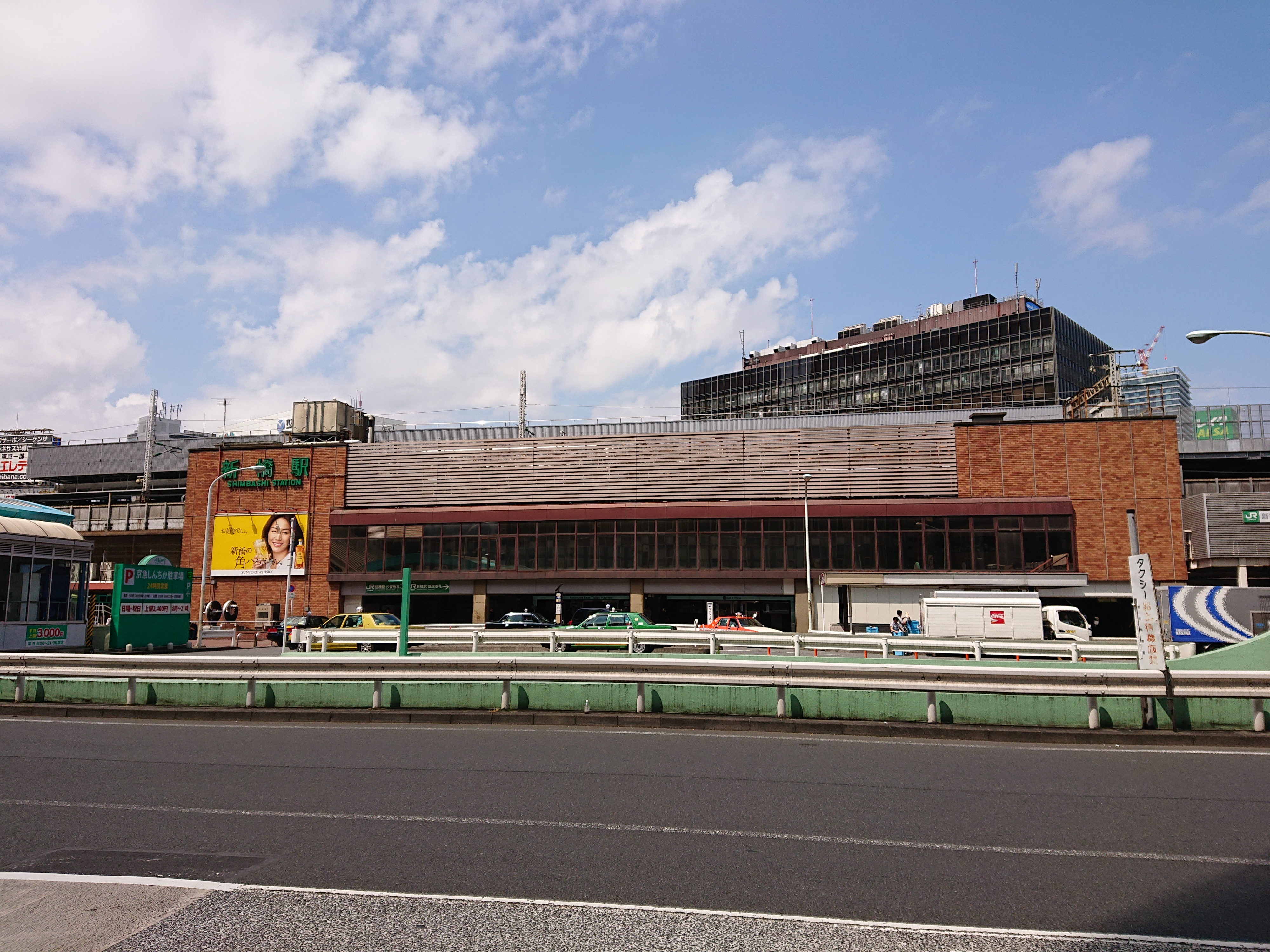 新橋駅。東京都港区